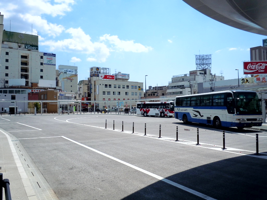 いわき駅南口バスターミナル